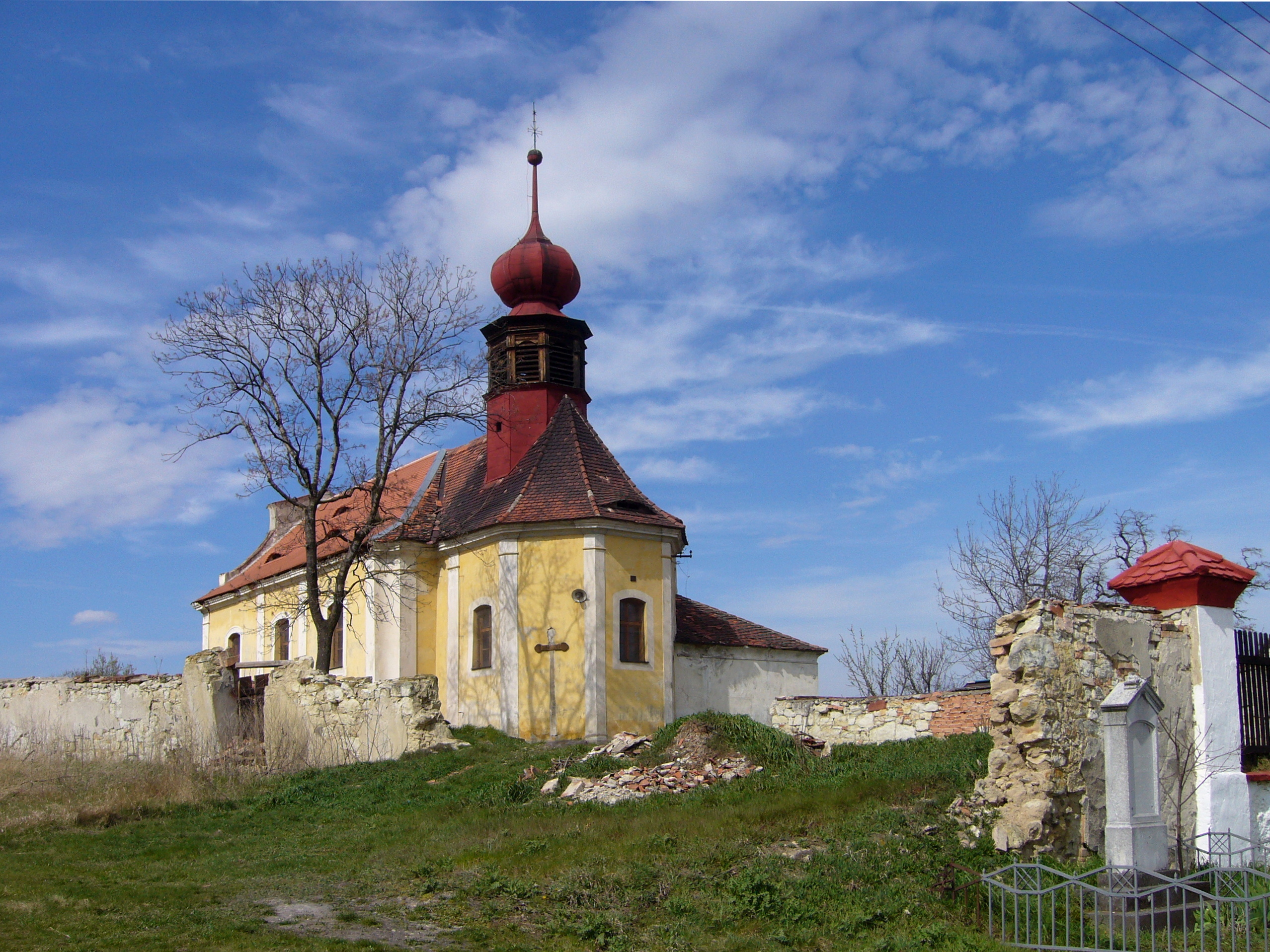 Kostel Narození Panny Marie, Mory.